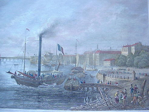 Stadtansicht von Bordeaux, kolorierter Stich von ca. 1850. Linkes Ufer der Garonne nach Süden.